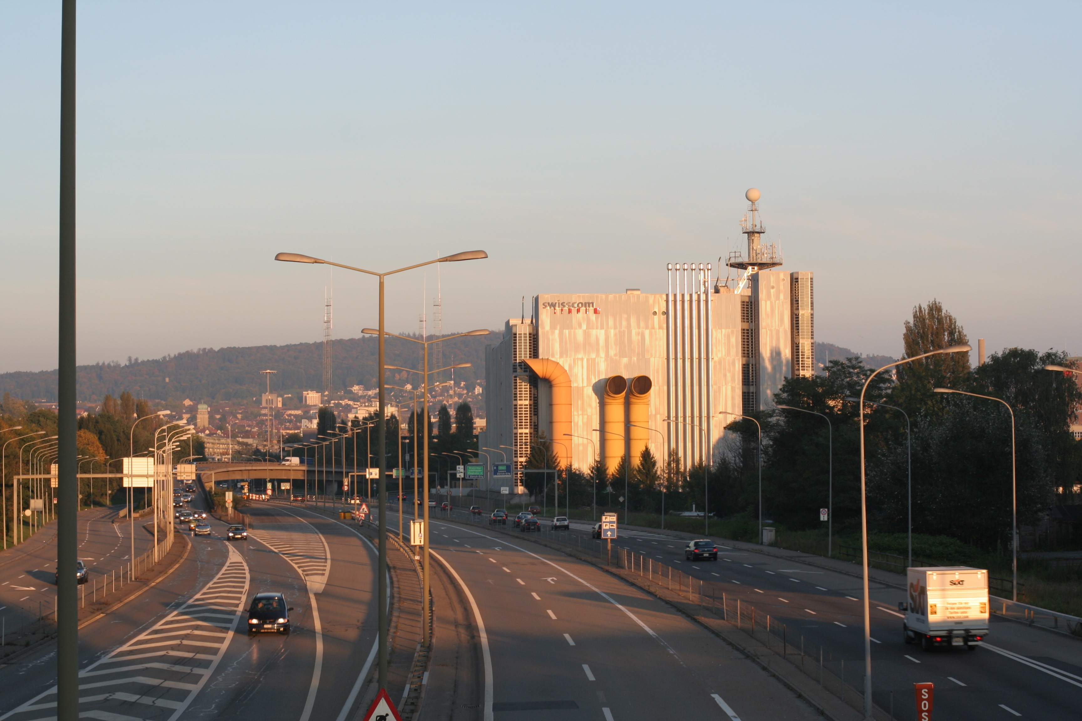 Fernmeldezentrum der PTT (heutige Swisscom) vom Architekt Theo Hotz in Altstetten, Zürich, Schweiz